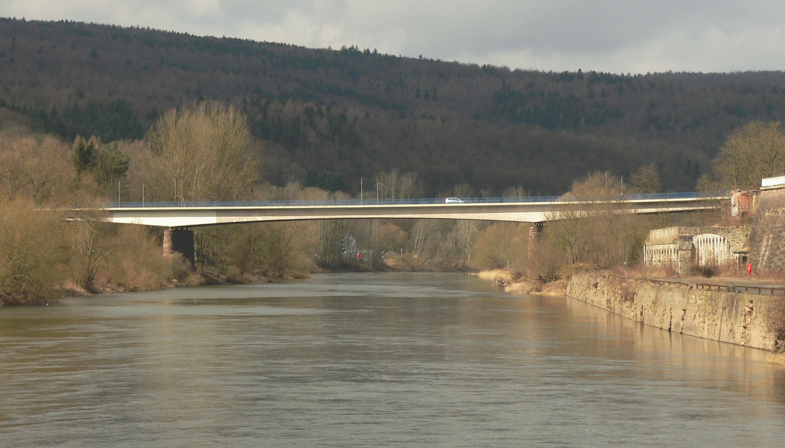 Weserbrücke in Hann. Münden, Blick vom Doktorwerder